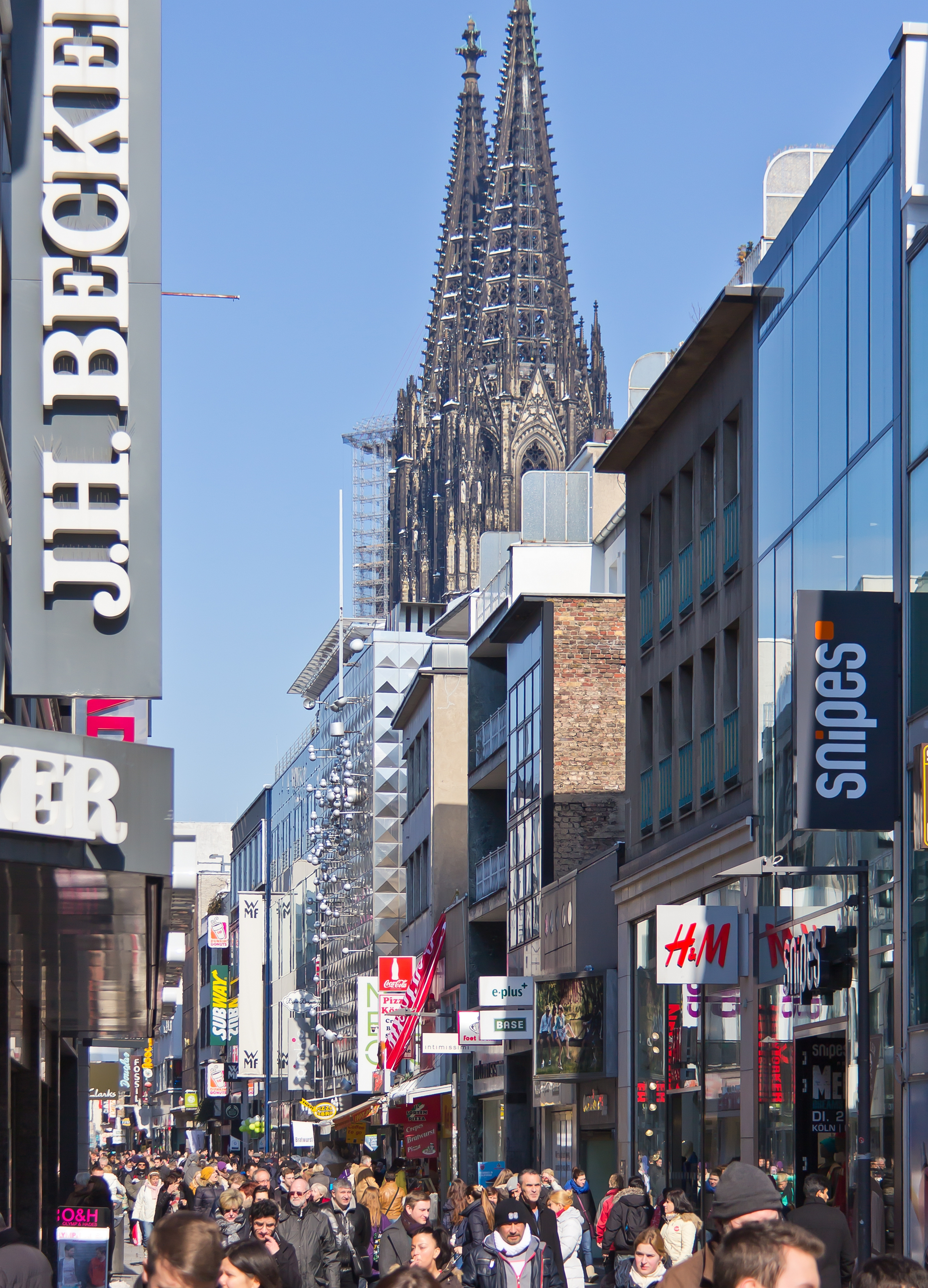 Blick in die Fußgängerzone Hohe Straße, Köln. Im Hintergrund der Kölner Dom